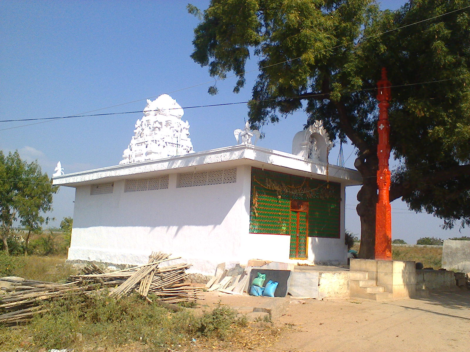 శ్రీఆంజనేయస్వామి దేవాలయం, మేళ్ళచెరువు